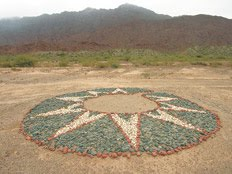 Estrella Diaguita en Villa San José de Vinchina